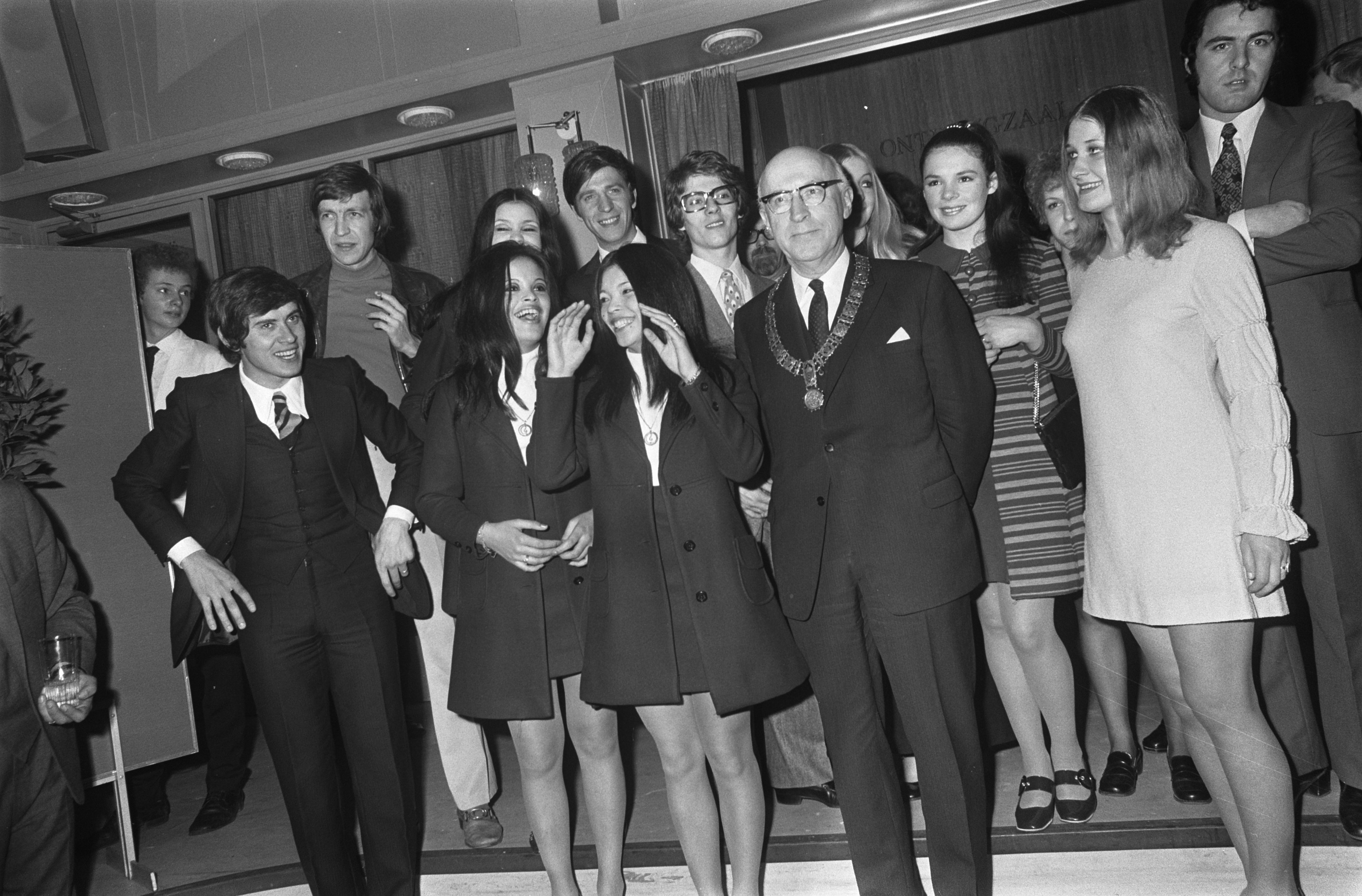 Collectie / Archief : Fotocollectie Anefo Reportage / Serie : Eurovisie Songfestival 1970 in RAI te Amsterdam Beschrijving : Burgemeester Samkalden ontvangt deelnemers aan Eurovisie Song Festival in Hotel Kras te Amsterdam. Samkalden met deelnemers Annotatie : Vlnr. Gianni Moandi, Henri Dès, Hearts of Soul, Jean Vallèe, Guy Bonnet, Mary Hopkin (achter Samkalden), Dana, Dominque Dussault, Eva Sršen, David Alexandre Winter Datum : 19 maart 1970 Locatie : Amsterdam, Noord-Holland Trefwoorden : burgemeesters, songfestivals Persoonsnaam : Samkalden, Ivo Fotograaf : Mieremet, Rob / Anefo Auteursrechthebbende : Nationaal Archief Materiaalsoort : Negatief (zwart/wit) Nummer archiefinventaris : bekijk toegang 2.24.01.05 Bestanddeelnummer : 923-3654